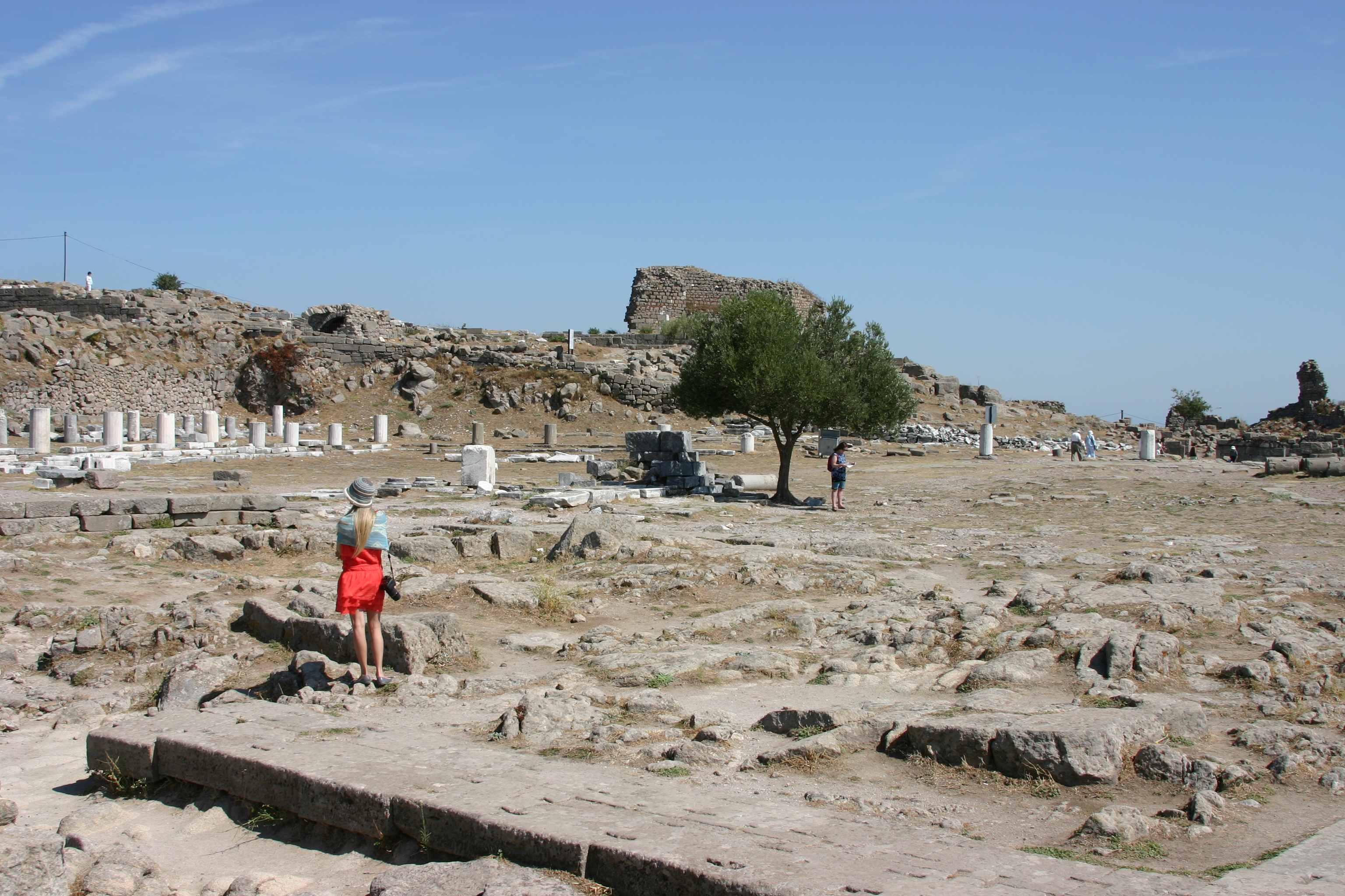 Templo de Atena em Pérgamo